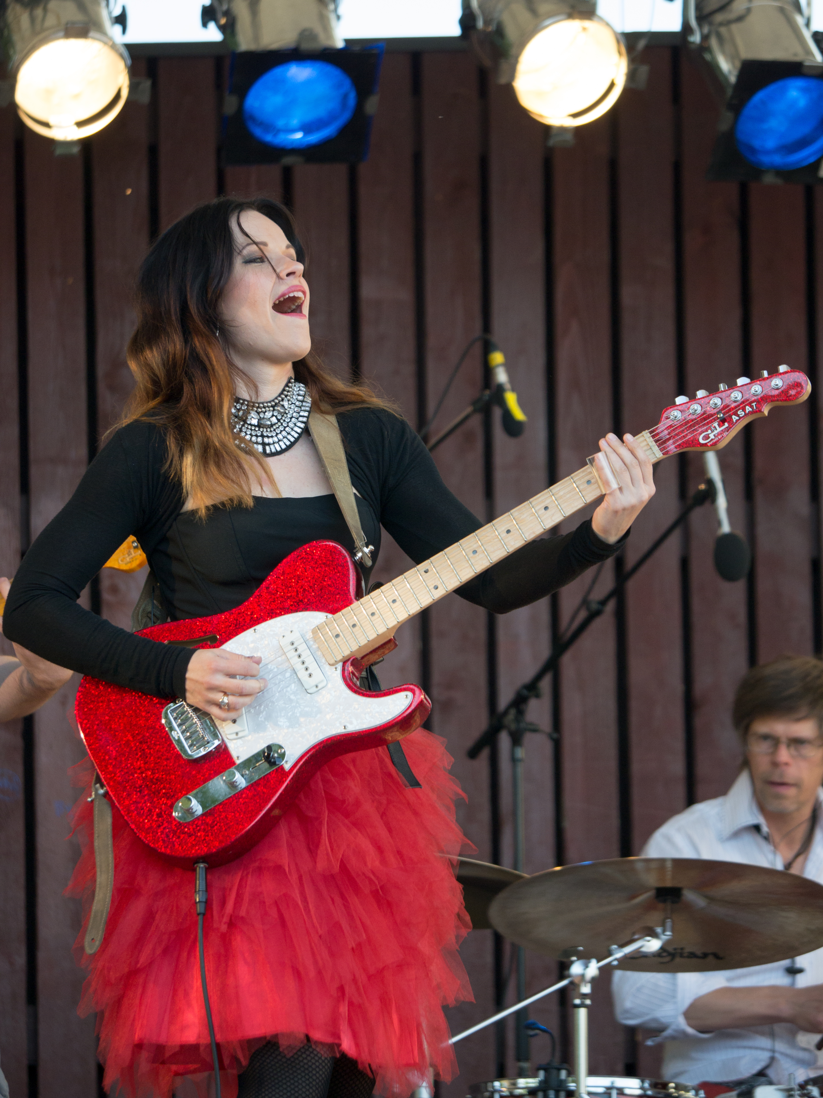 Erja lyytinen kitaristi